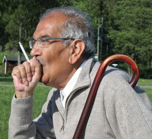 استاد واصف باختری